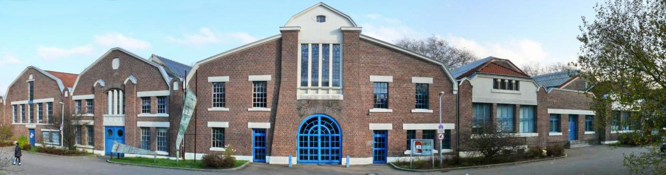 Veranstaltungszentrum Flottmannhallen in Herne